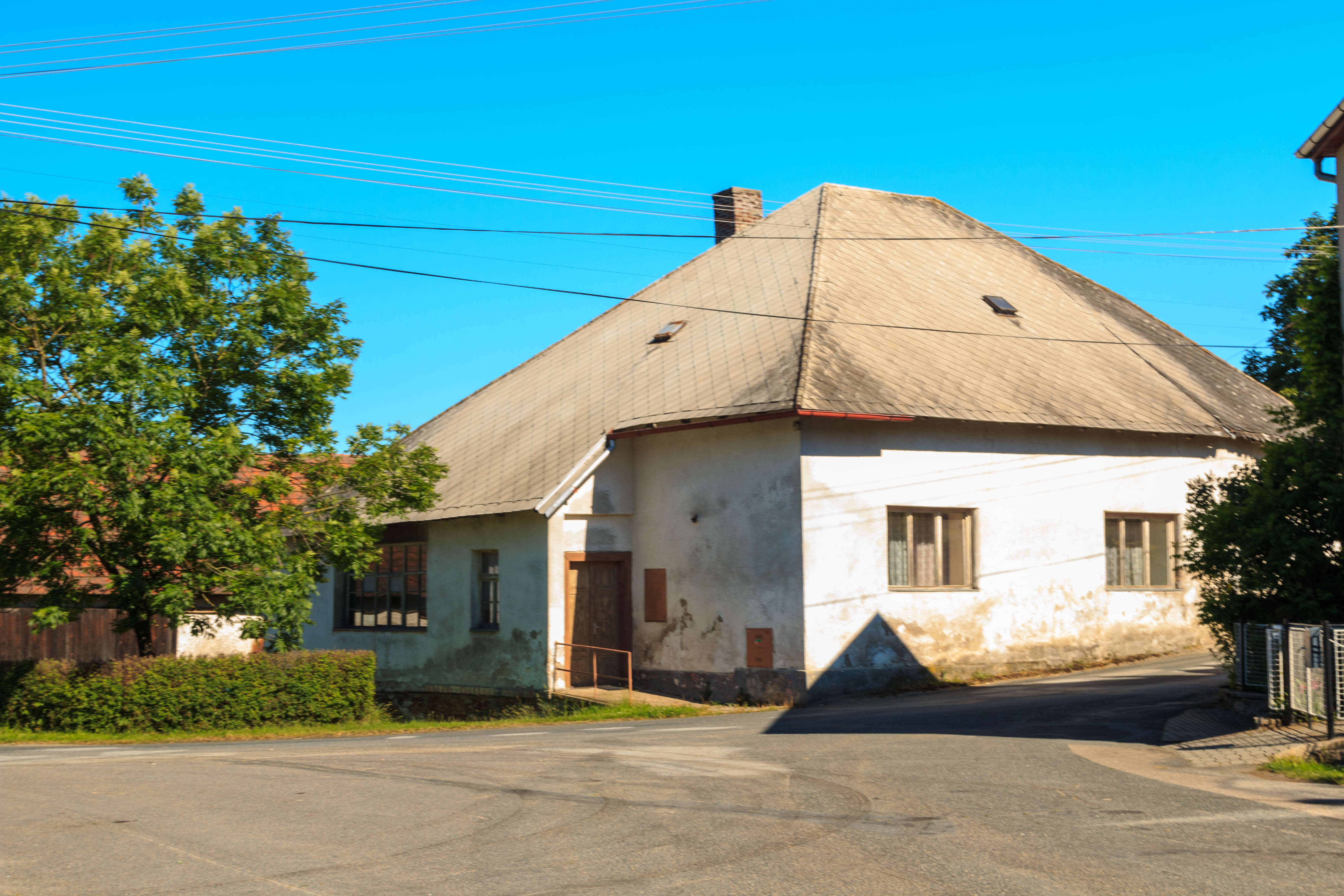 Rybníček u Havlíčkova Brodu čp. 28